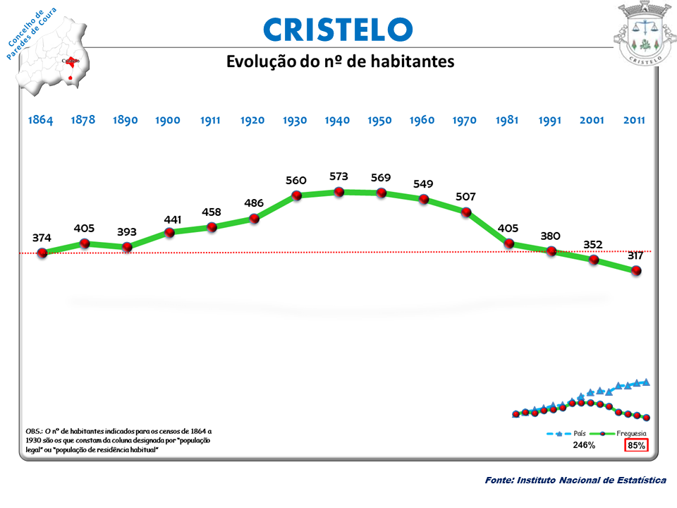 Censos 1864/2011